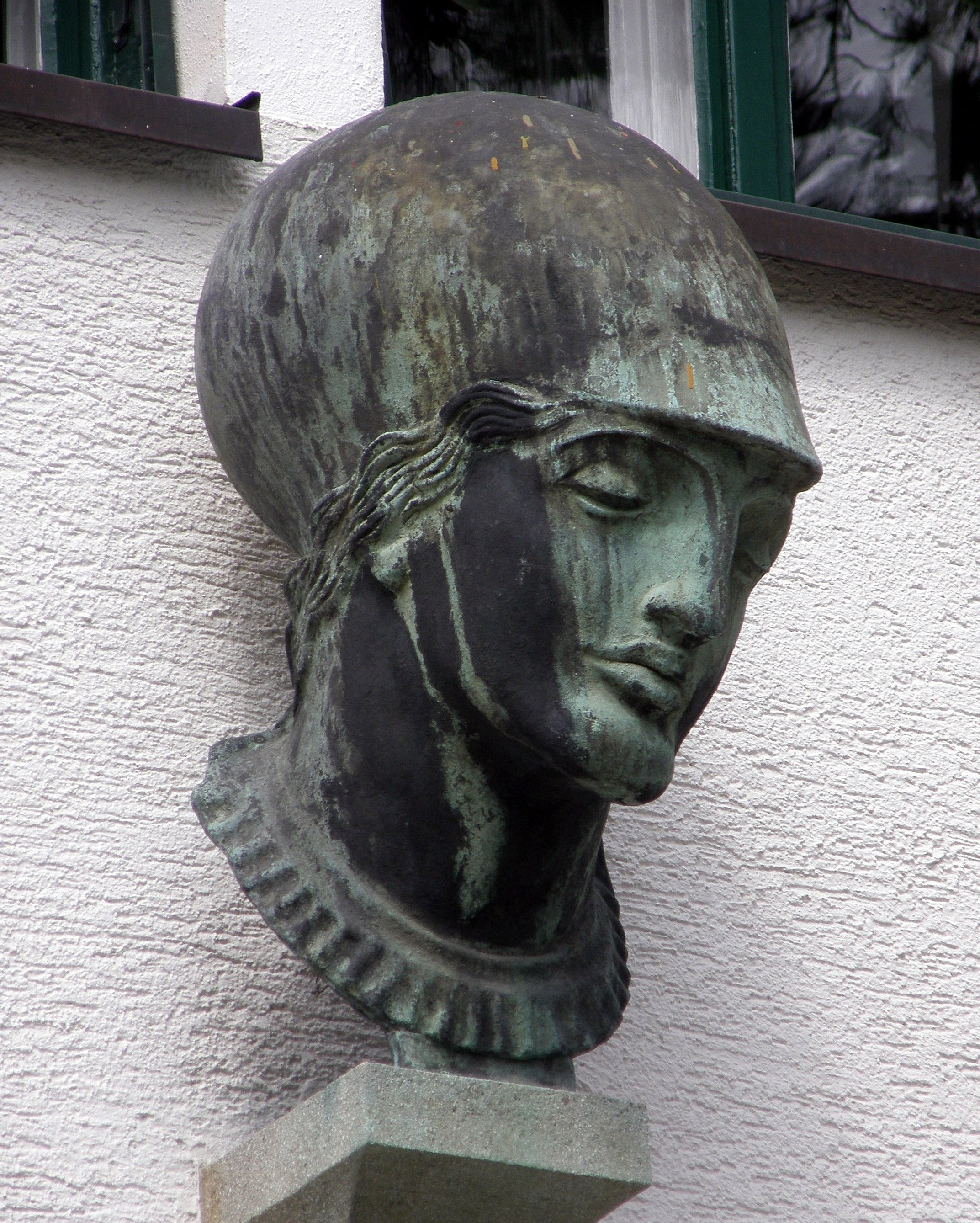 "Kopf der Minerva", geschaffen 1929 von Carl Ebbinghaus. Bronze, am Gebäude des ehemaligen Instituts für Hirnforschung der Kaiser-Wilhelm-Gesellschaft in Berlin-Buch.